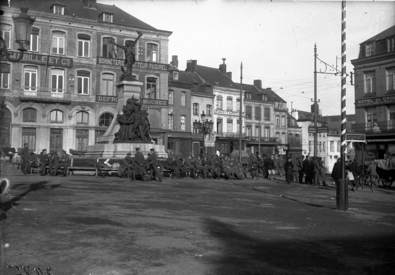 Frankreich, Hautmont, deutsche Besatzung Frankreich-Nord, Hautmont.- Deutsche Besatzung, Stadtansicht, Soldaten vor einem Denkmal sitzend, deutsche Wegweiser.